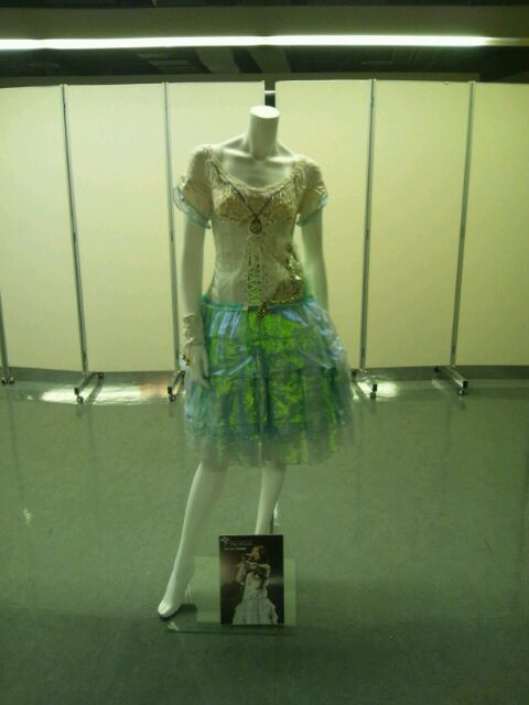 アニメロミックス Presents Minori Chihara Birthday Live 2012 supported by JOYSOUND 衣装展覧会より 『Minori Chihara Live Tour 2010 〜Sing All Love〜』の衣装。